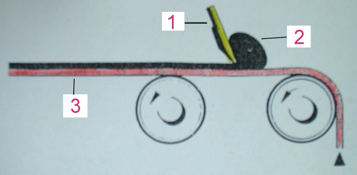 Schema: Beschichtung mit Luftrakel Česky: Schema nanosovani se vzdusnou sterkou